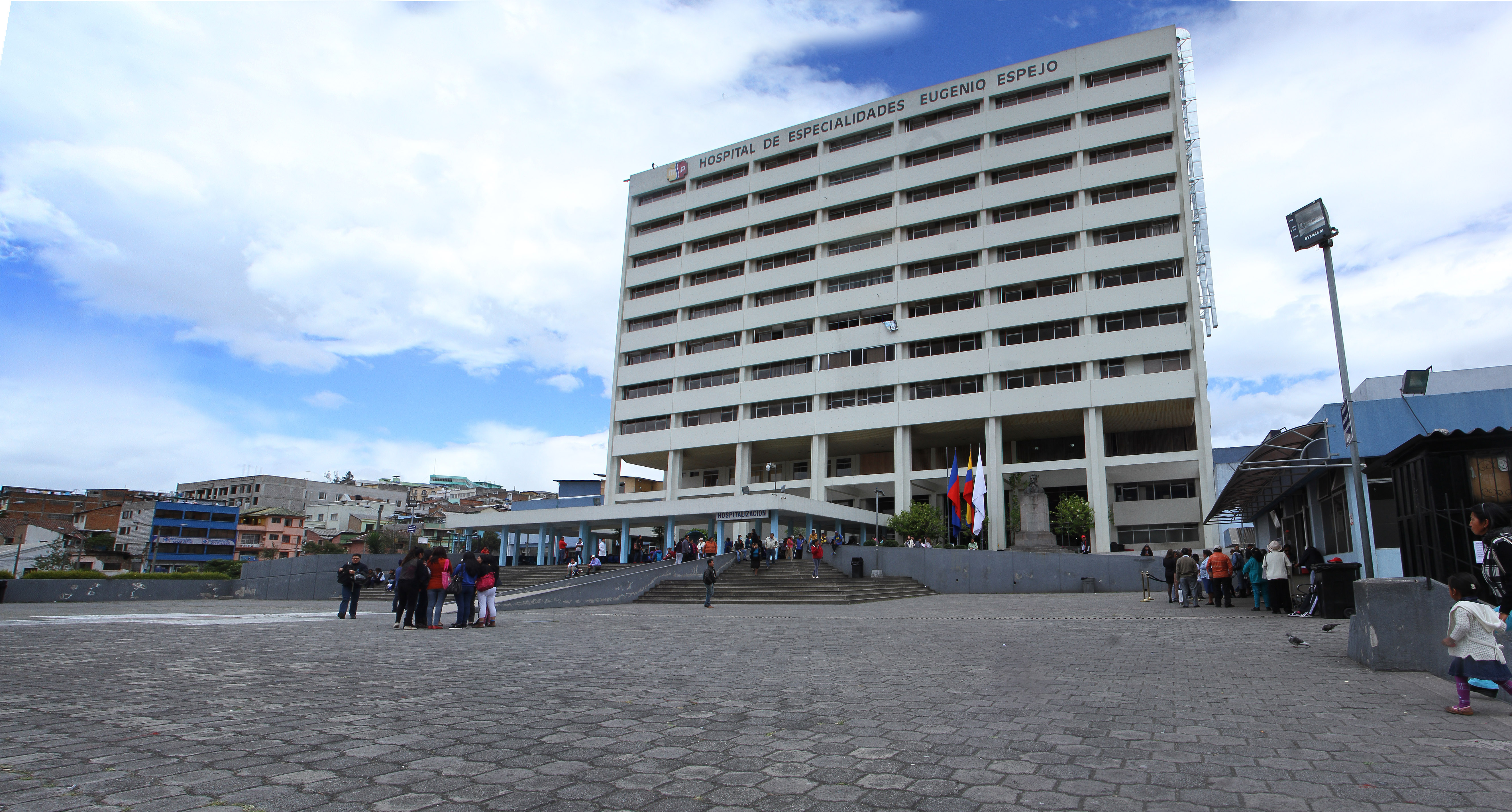 Quito, 4 jun (Andes).- El día de hoy se oficializó la acreditación internacional para el hospital Eugenio Espejo en la ciudad de Quito. En el evento estuvo presente la ministra de Salud Pública Karina Vance y Lenin Mantilla, gerente del Hospital. Fotografías: Carlos Rodríguez/Andes.